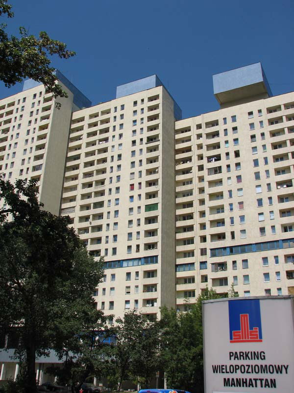 Śródmiejska Dzielnica Mieszkaniowa w Łodzi (tzw. łódzki Manhattan) - zespół największych w Polsce budynków mieszkalnych (megaszaf) wykonanych w technologii tzw. "wielkiej płyty". 23-kondygnacyjny 78-metrowy najwyższy w Łodzi budynek przy al. Piłsudskiego 7.